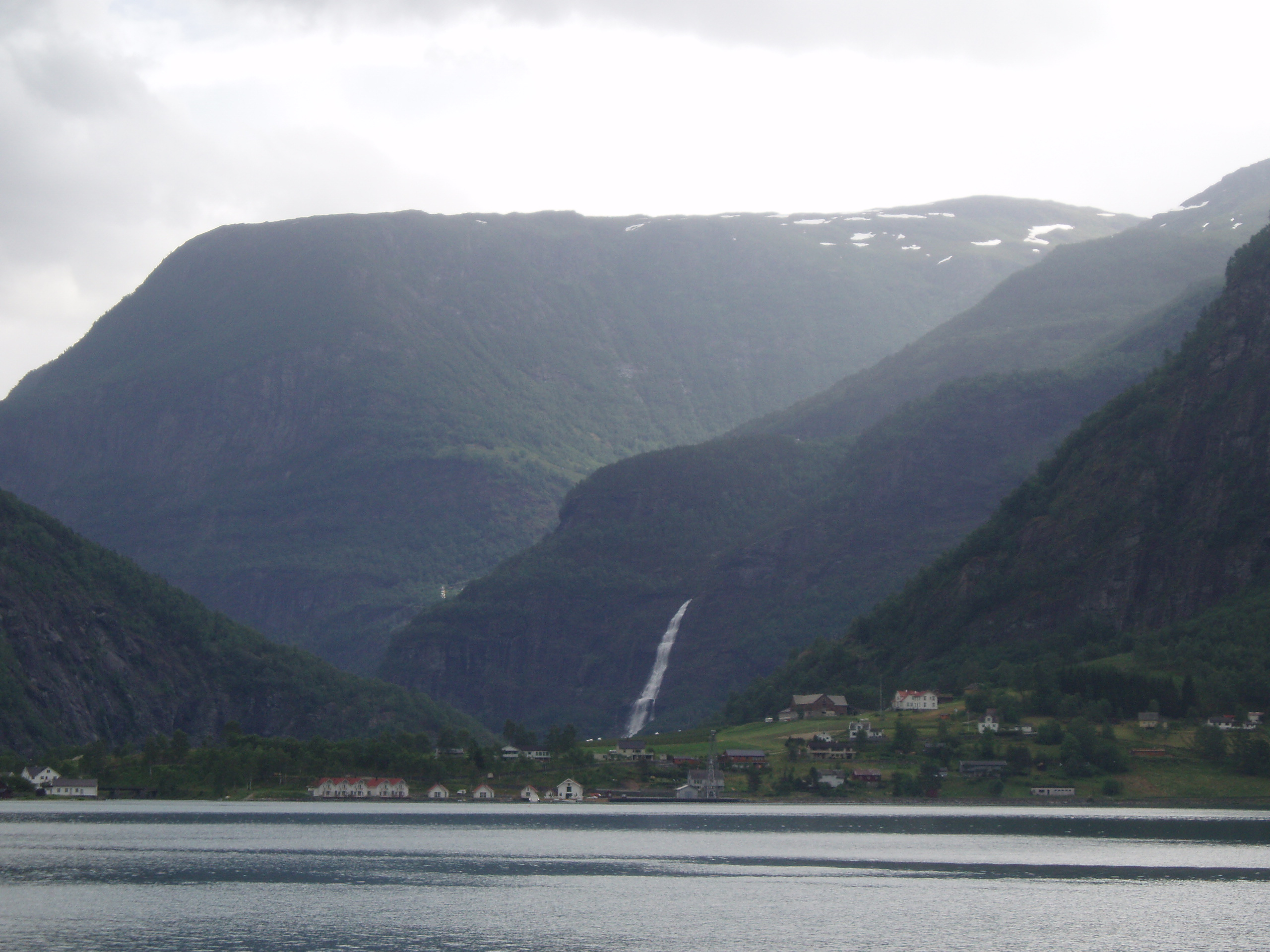 Skjolden at Lustrafjorden in Luster, Norway.